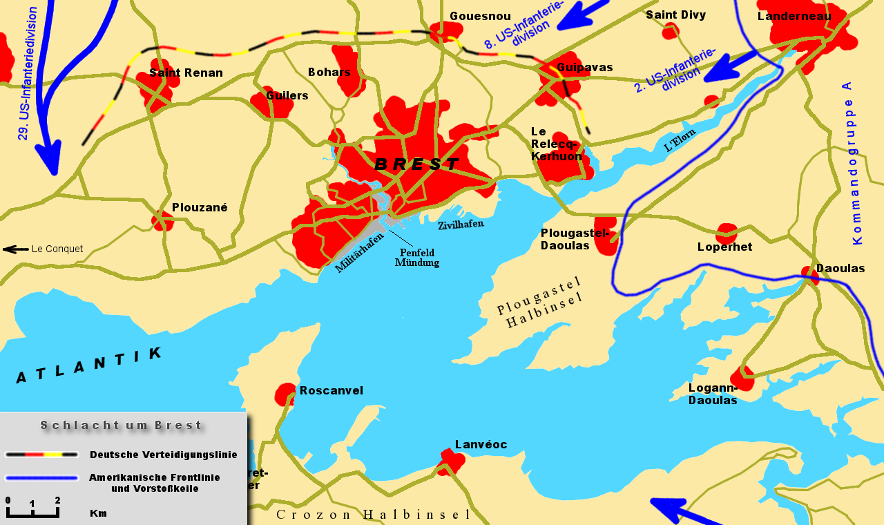 Description: Schlacht um Brest: Situation beim ersten US-Angriff am 25./26. August 1944 Source: self-made by User:W.wolny